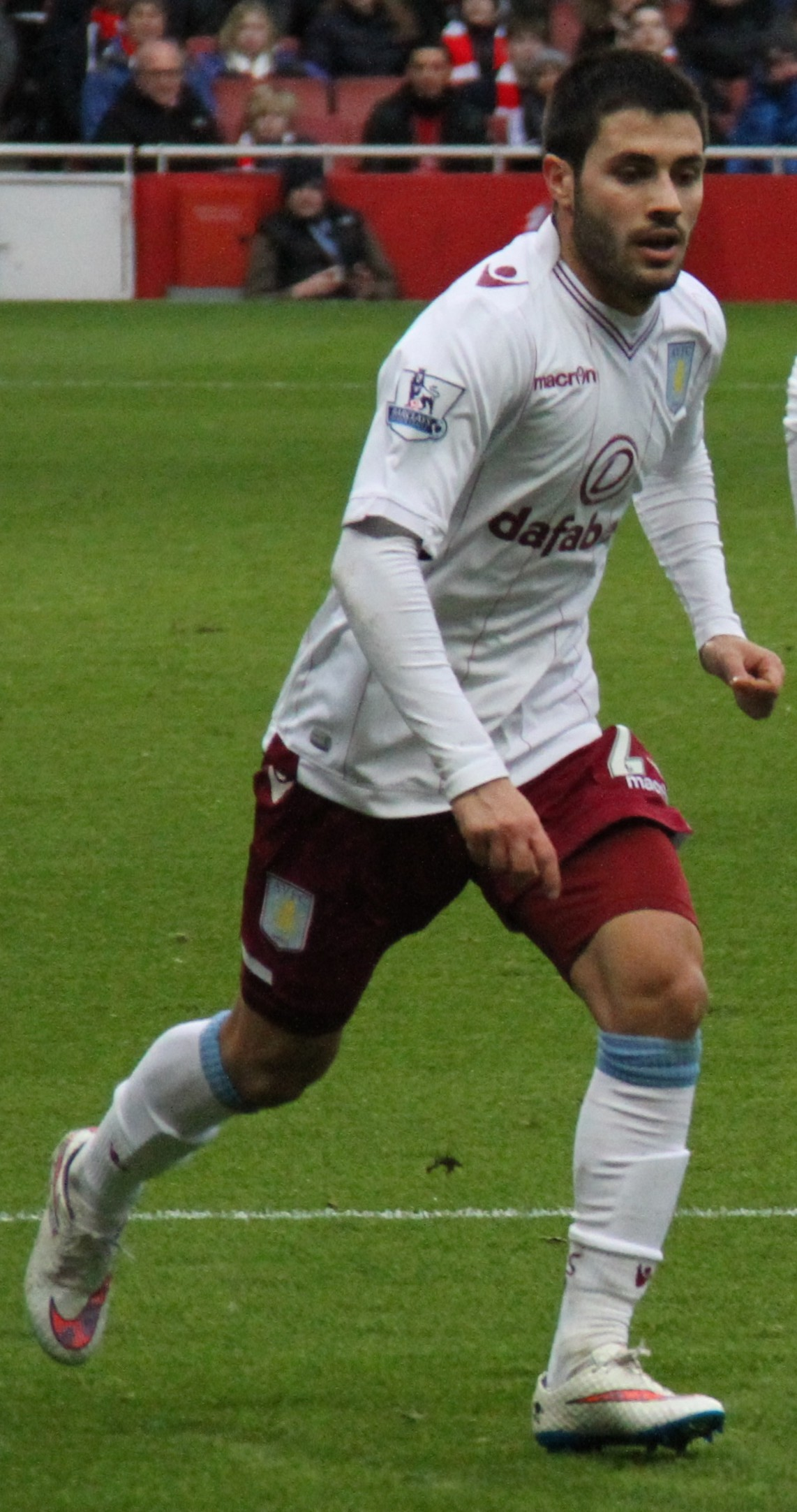 Carles Gil.